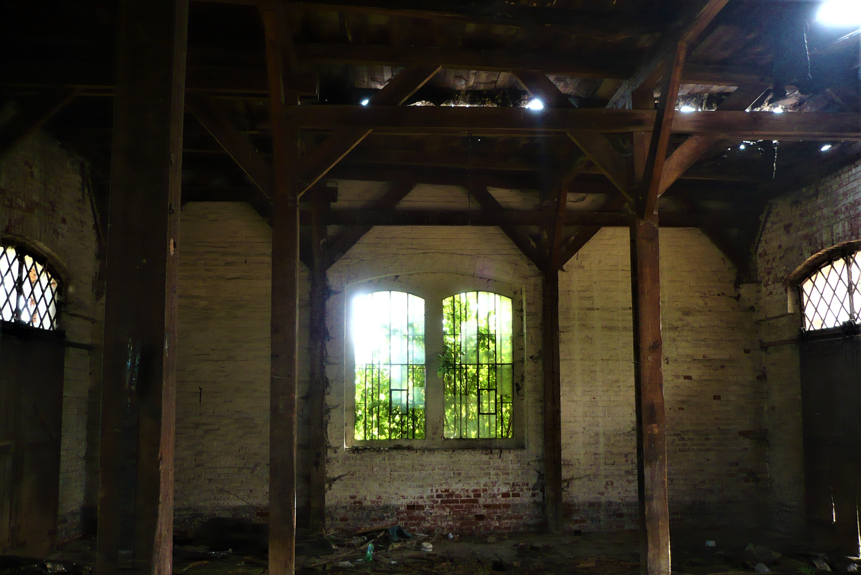 Gorzuchów - kolejowy przystanek osobowy Gorzuchów Kłodzki